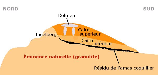 Coupe nord-sud du tumulus de Beg an Dorchenn (ou pointe de la Torche), en Plomeur, dans le pays Bigouden, Finistère, Bretagne. Ne cherchant qu'à faire comprendre l'organisation de ce tumulus, je me suis inspiré, mais grossièrement, sans respect des formes ni des proportions ni des indications données, d'un croquis de Pierre-Roland Giot, publié p. 168 de l'article « Le tumulus mégalithique de Beg an Dorchenn en Plomeur (Finistère) », Gallia, t. V, 1947.